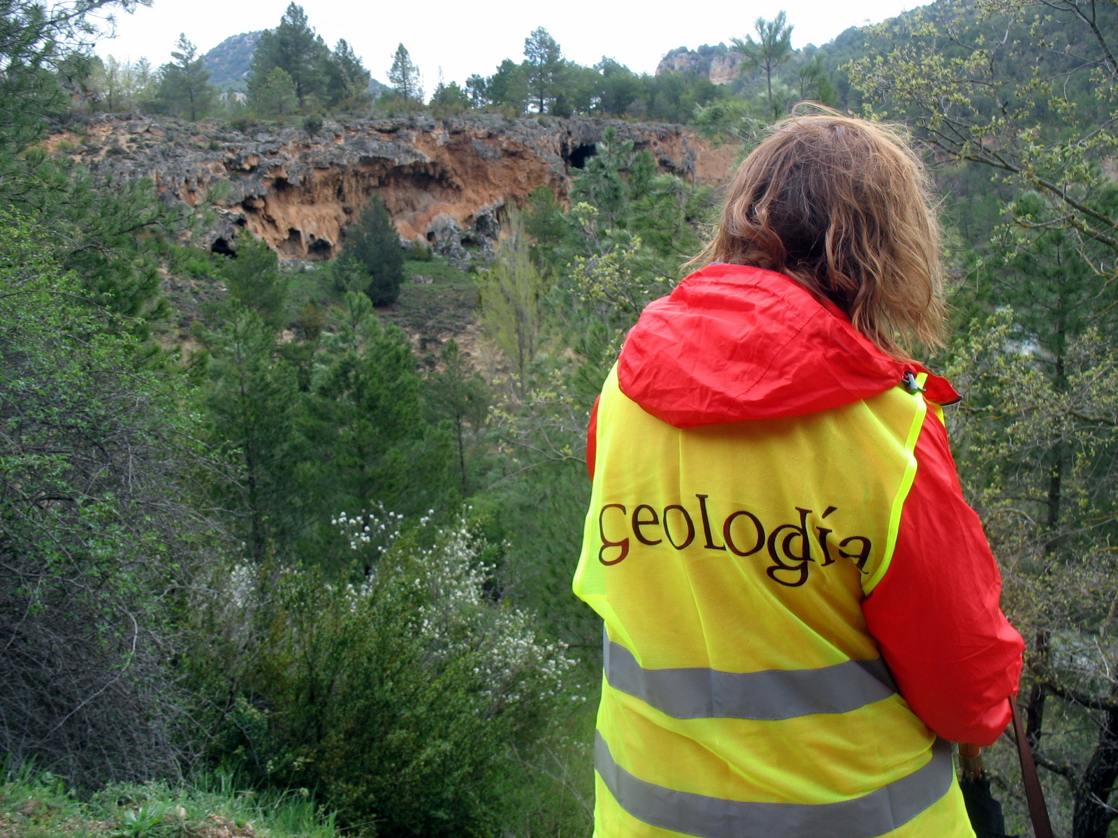 Parada de la excursión geológica del Geolodía 16 de Guadalajara: Edificio tobáceo del Campillo (Zaorejas, Guadalajara, España)